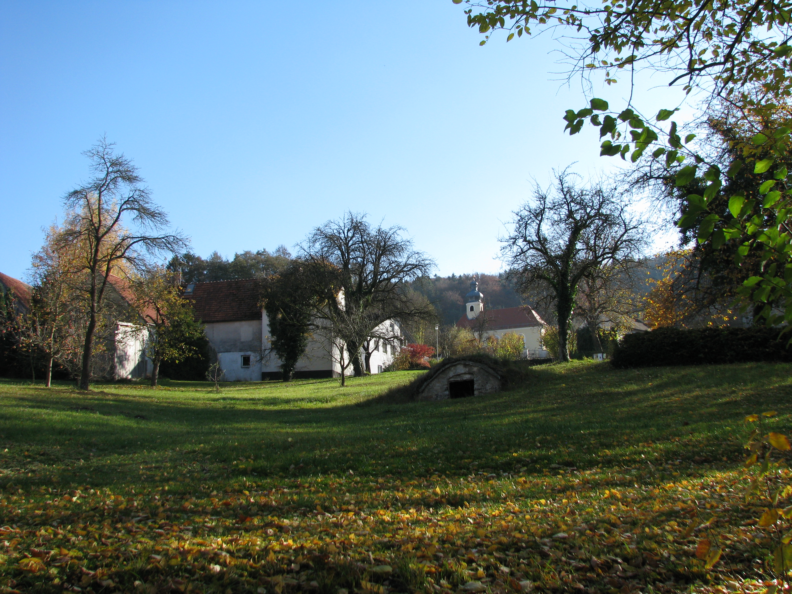 Lauterbach, Ortsteil von Freystadt im Landkreis Neumarkt in der Oberpfalz, Bayern, Dorfmitte